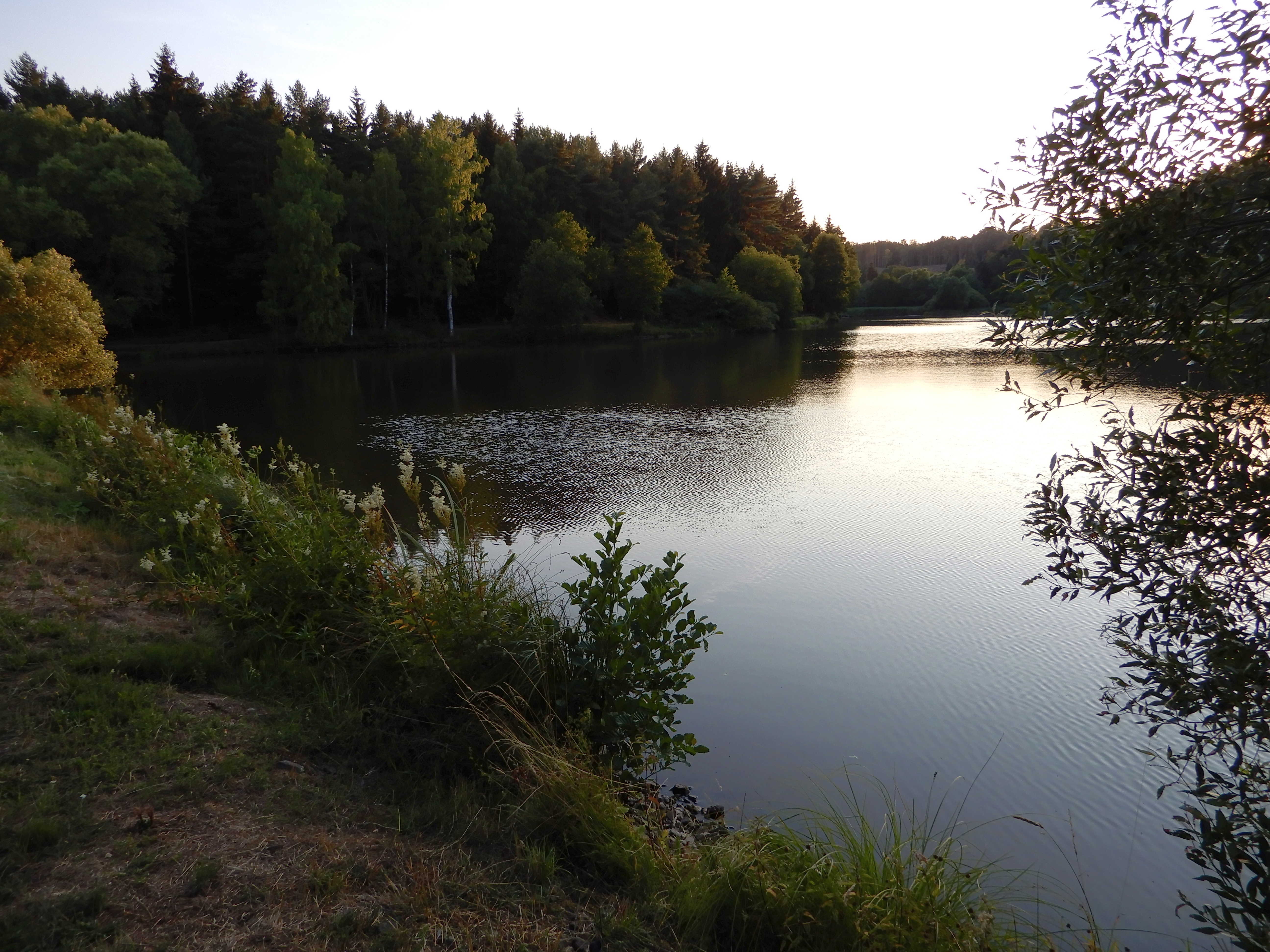 Mönchsteich bei Königerode